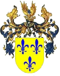 Escudo de Tórtola